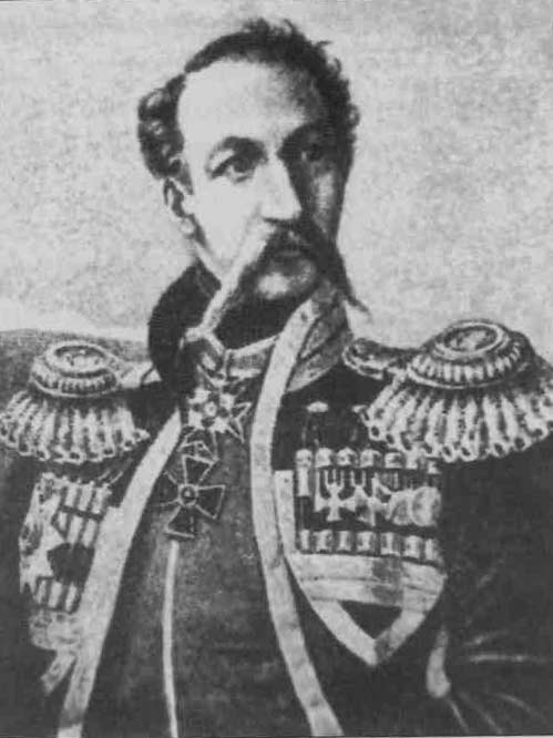 Grigori Jristoforovich Zas